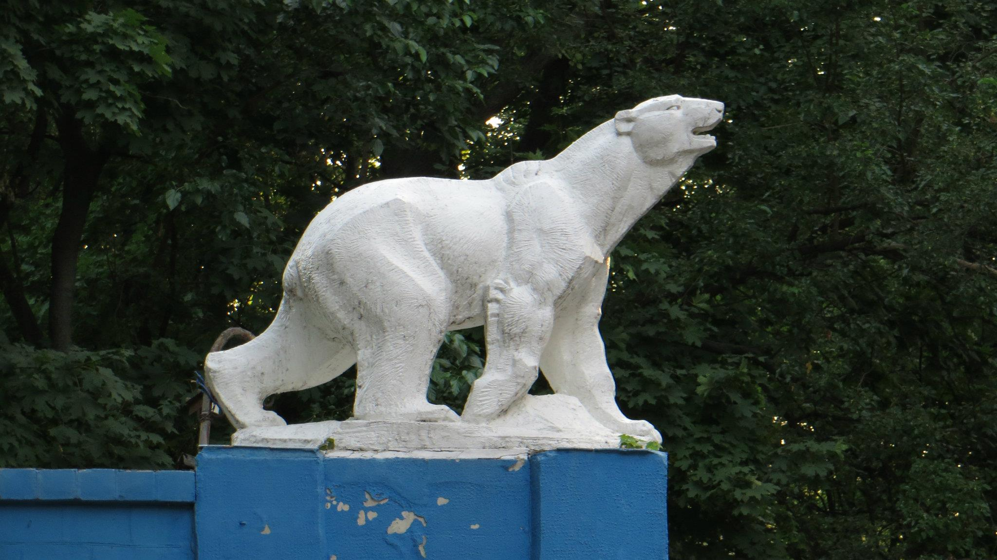 Архитектор В.П.Ширшов и скульптор В.А.Ватагин. Уничтожена во время войны и восстановлена в 1984 г. С.А.Якубовичем